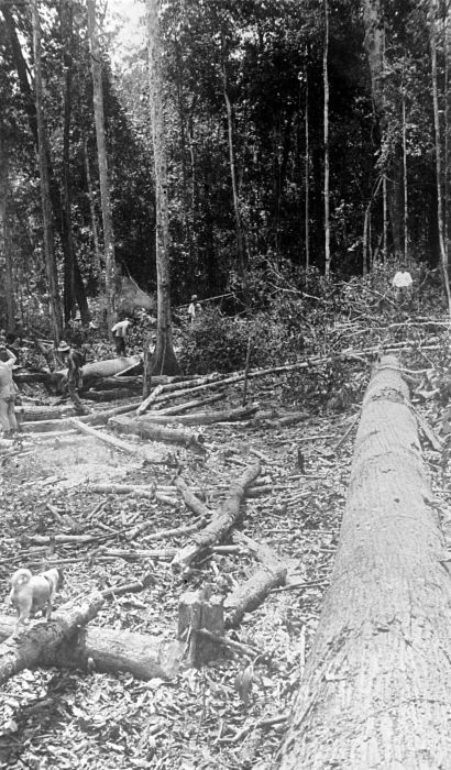 Repronegatief. Gekapte Meranti, Lobok Besar, 1930